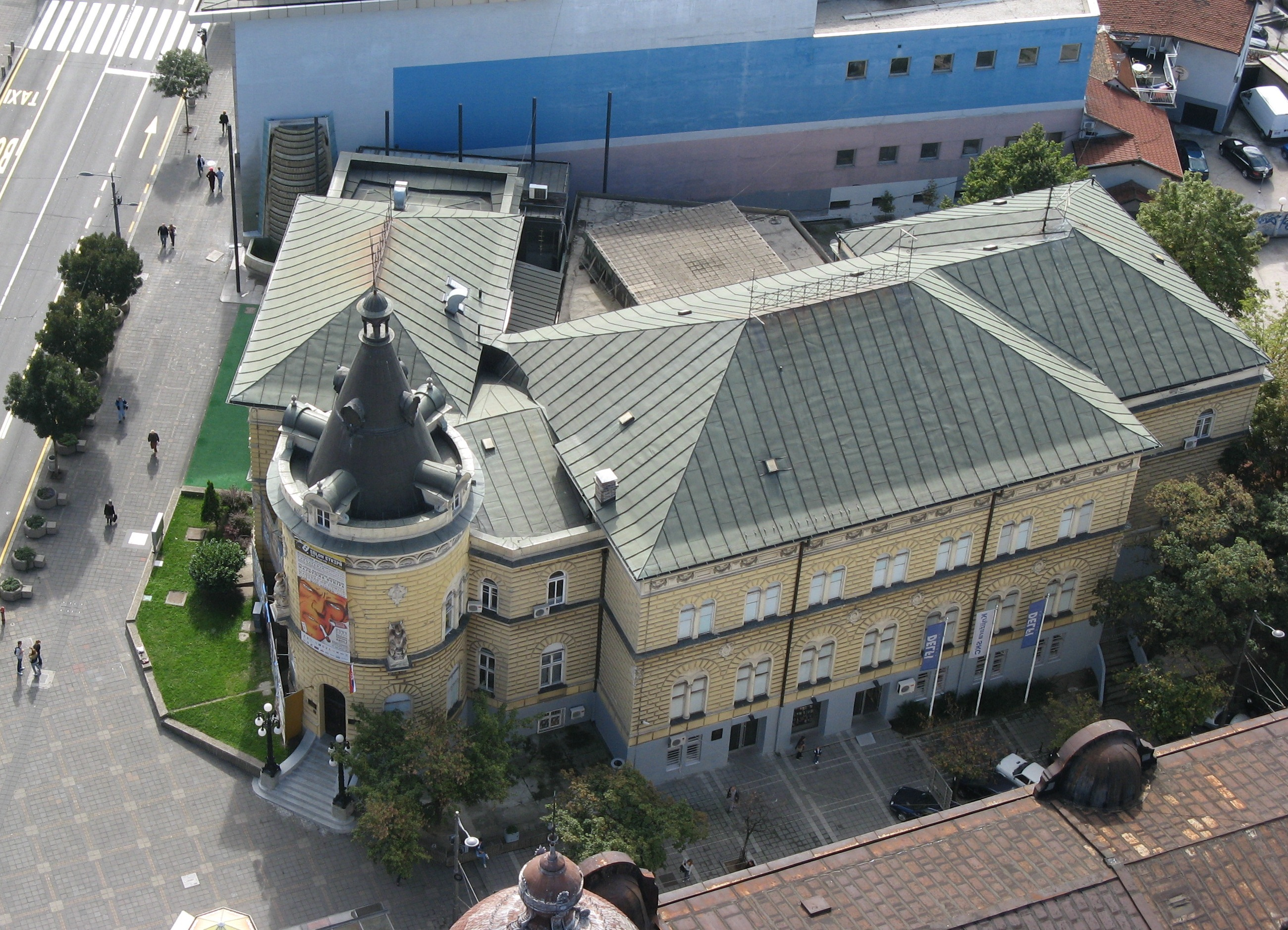 Зграда је подигнута према пројекту српског архитекте Јована Илкића крајем 19. века. До почетка Другог светског рата, у њој се налазио Официрски дом, а од 1968. до данас Студентски културни центар.